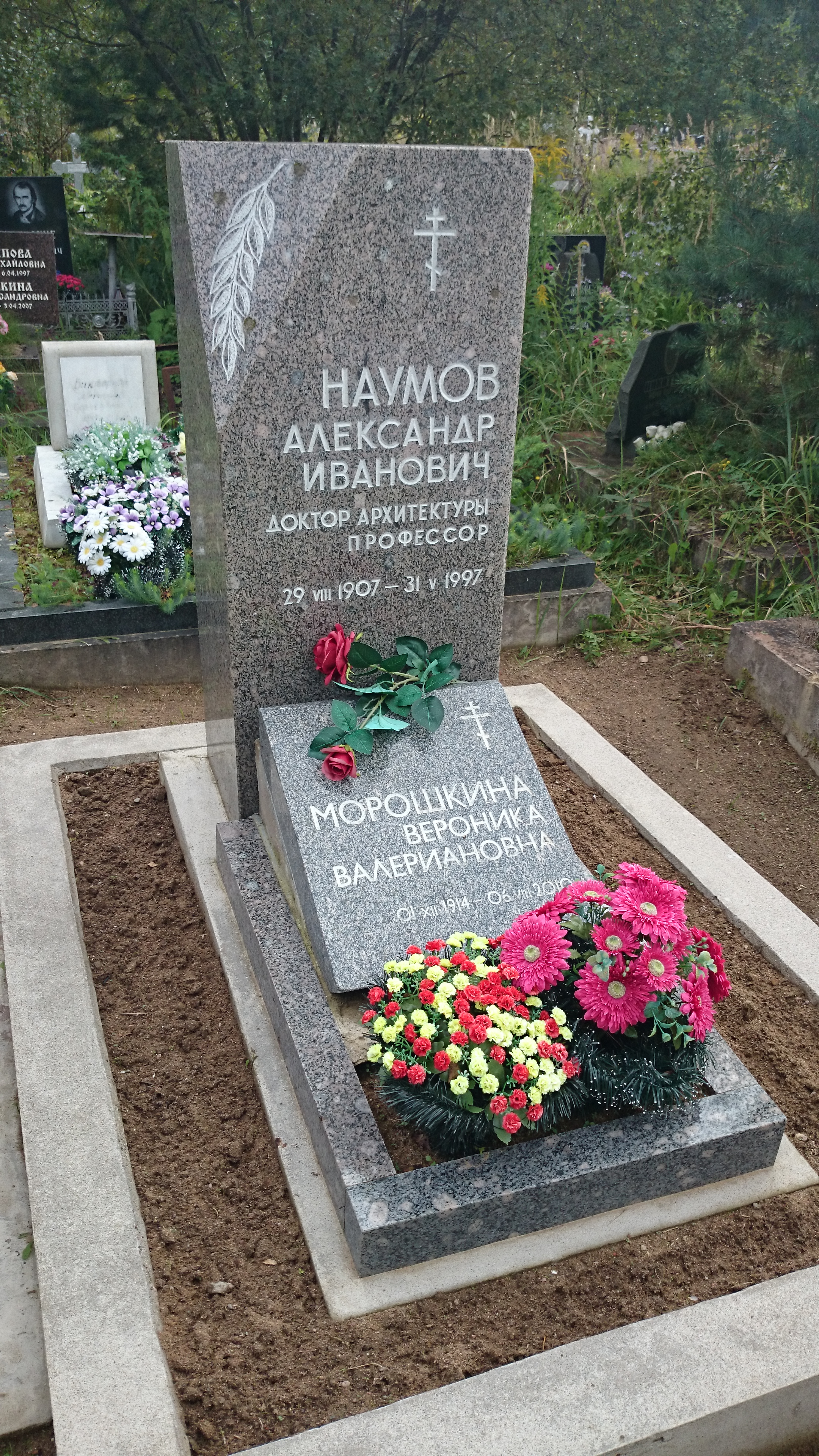 Место захоронения архитектора Александра Ивановича Наумова на Северном кладбище в Санкт-Петербурге.